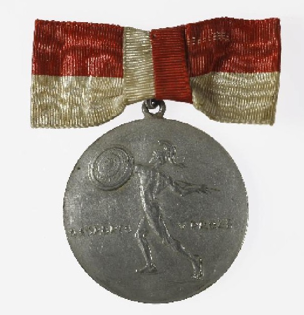 Medaile R. Richtera avers, 1916